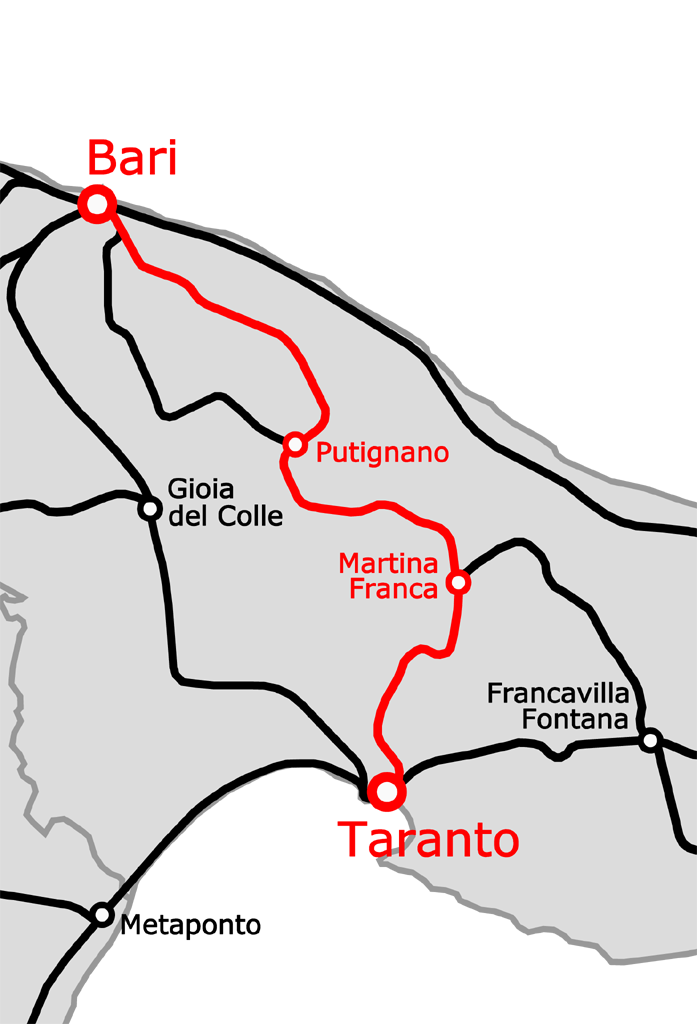 Tracciato della ferrovia Bari - Martina Franca - Taranto